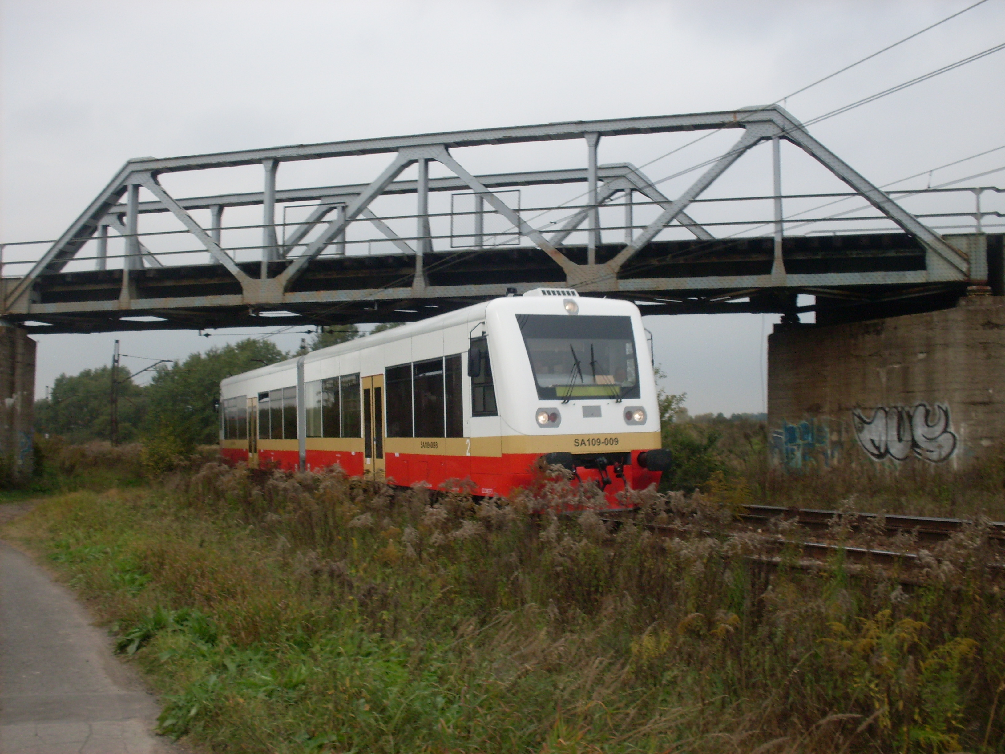 SA 109-009 w Krzeszowicach pod wiaduktem bocznicy kolejowej do Kopalni Wapienia Czatkowice